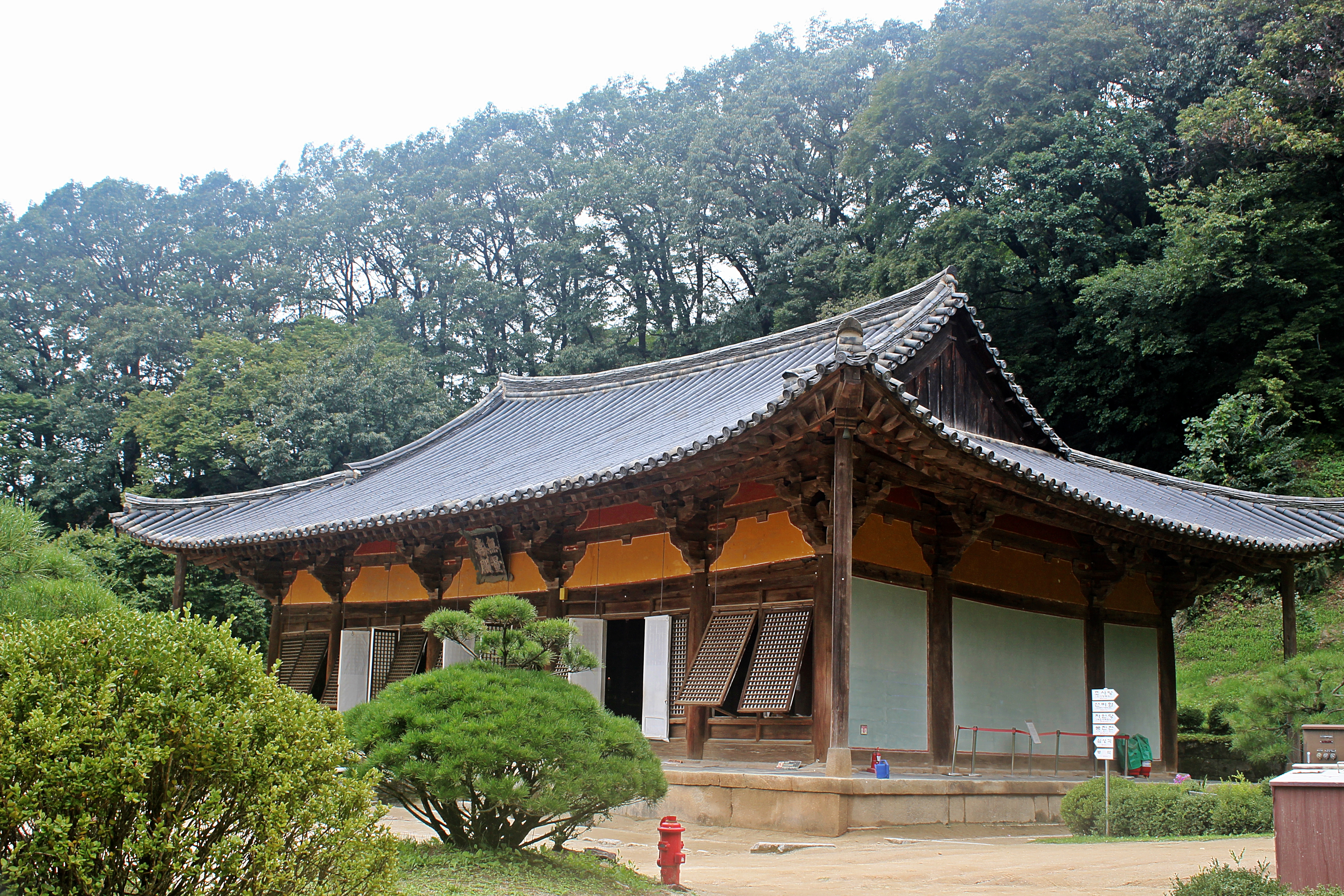 부석사 무량수전 (5 )